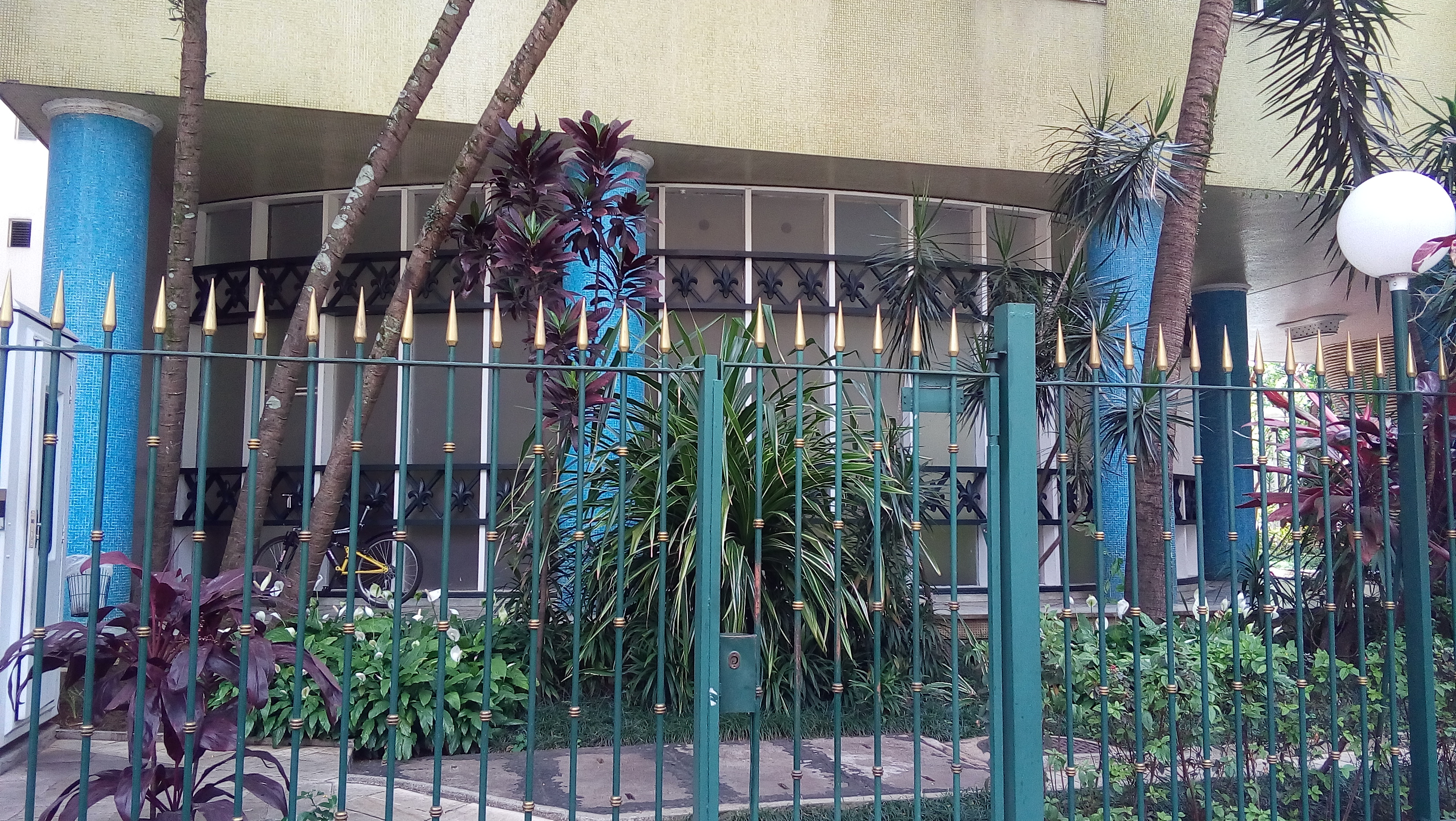 Detalhe externo do hall de entrada do Edifício Bretagne, São Paulo (SP), Brasil